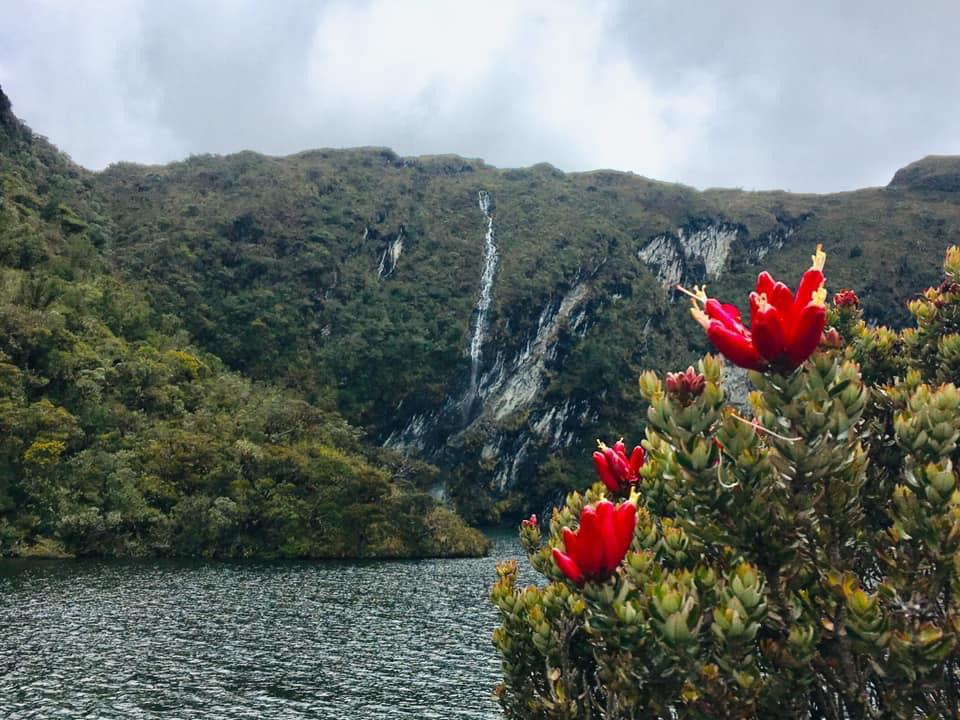 Las tres lagunas es un sitio turístico del cantón Chordeleg caracterizado por su belleza natural y sus afluentes.